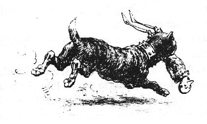 Il cane mastino Alidoro salva Pinocchio dal pescatore verde. Illustrazione di Carlo Chiostri (1863 - 1939) dal libro di Collodi "Le avventure di Pinocchio", 1901